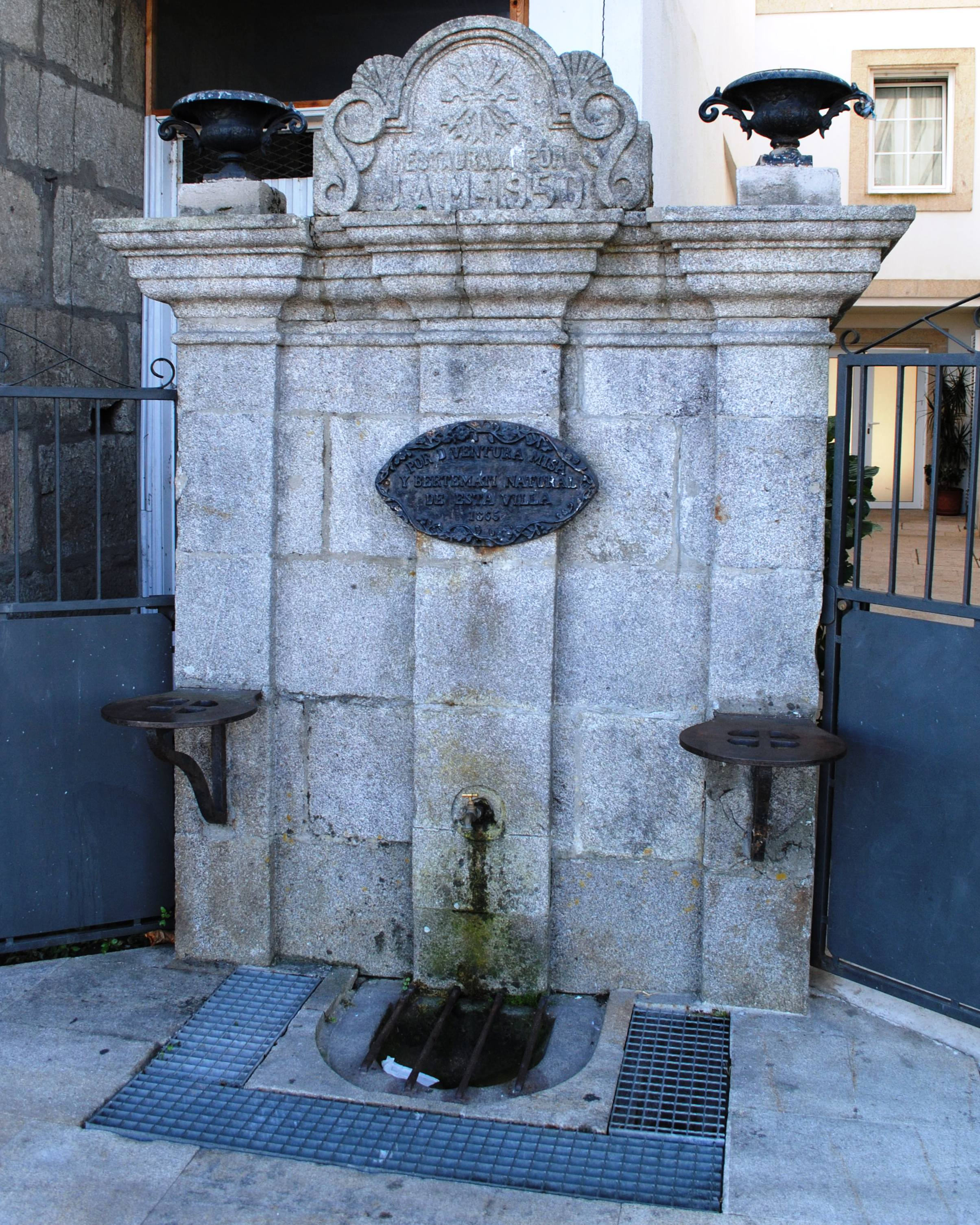 Véxase o título e as categorías